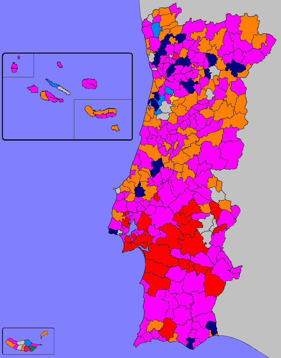 Mapa descritivo do partido vencedor por Concelho